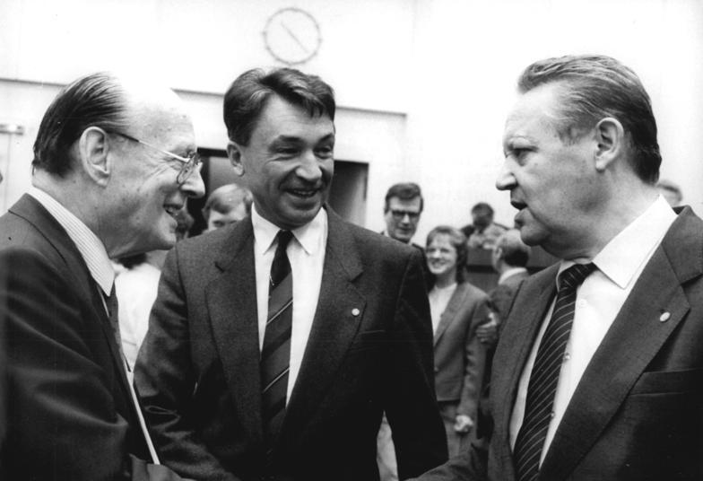 ADN-ZB Mittelstädt 24.10.1989 Berlin: VK-Tagung Die Volkskammer der DDR trat zu ihrer 10. Tagung zusammen. Auf Antrag der SED-Fraktion erfolgte die Wahl in die höchsten Staatsämter. Vor Beginn der Tagung nutzten (v.l.n.r.) Prof. Dr. Dr. Manfred von Ardenne, der Minister für Gesundheitswesen, Prof. Dr. so. med. Klaus Thielmann, und Günter Schabowski, Mitglied des Politbüros und 1. Sekretär der SED-BL Berlin, die Gelegenheit zu einem Meinungsaustausch über die jüngsten Ereignisse.